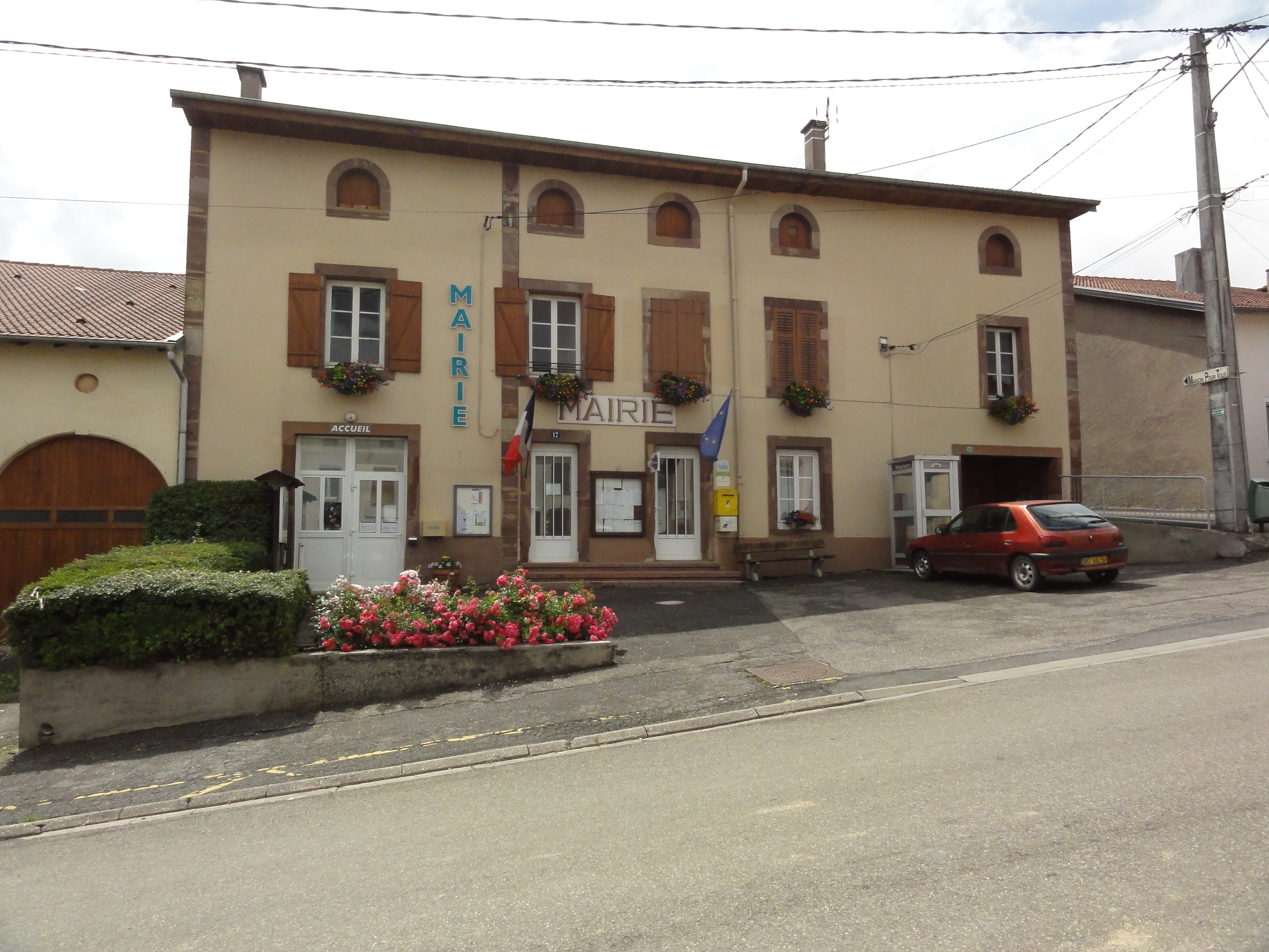 Fontenoy-la-Joûte (M-et-M) mairie